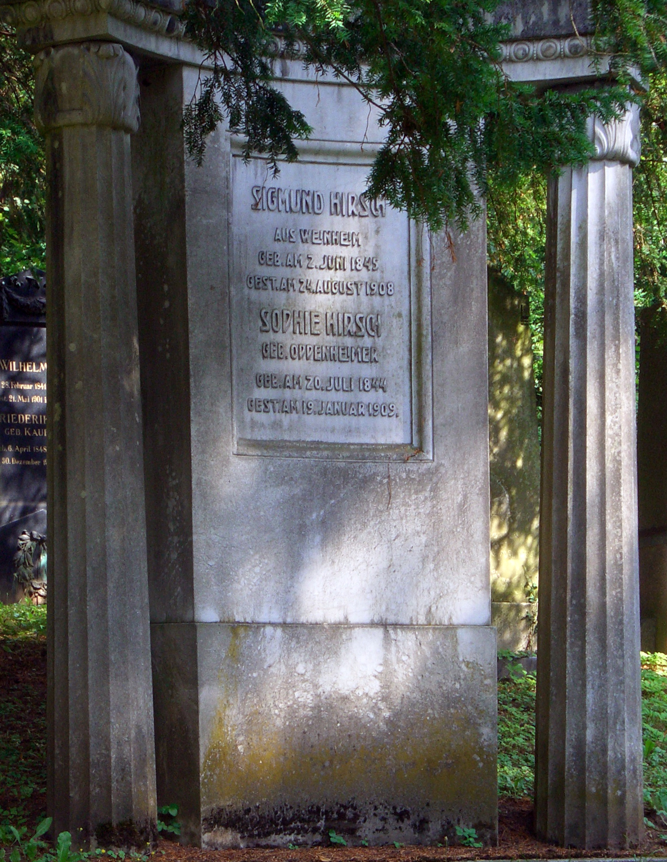 Grabmal für Sigmund Hirsch auf dem Heidelberger Bergfriedhof